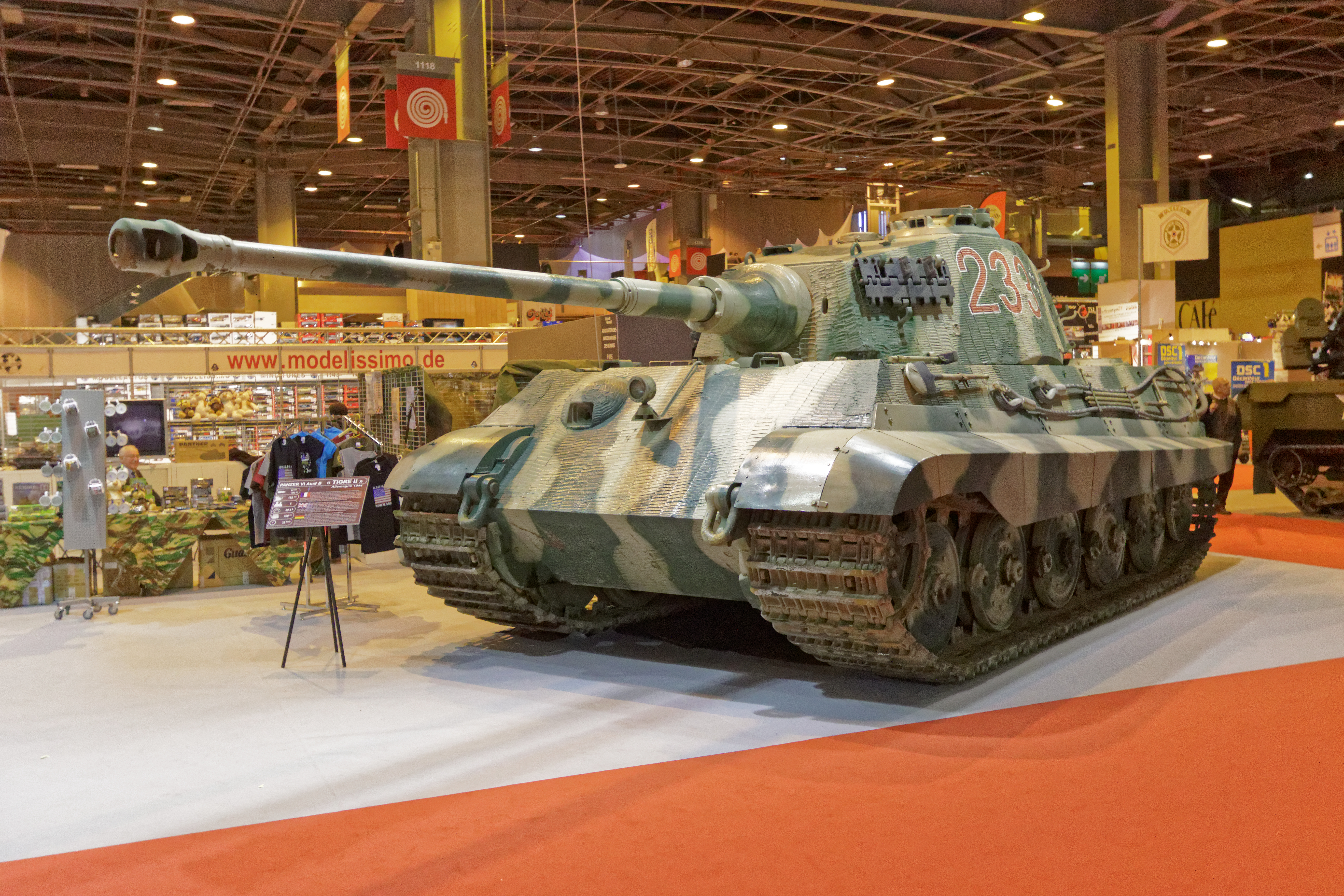 Un Panzer VI Ausf B Tigre II présenté lors du salon Rétromobile de Paris 2015.